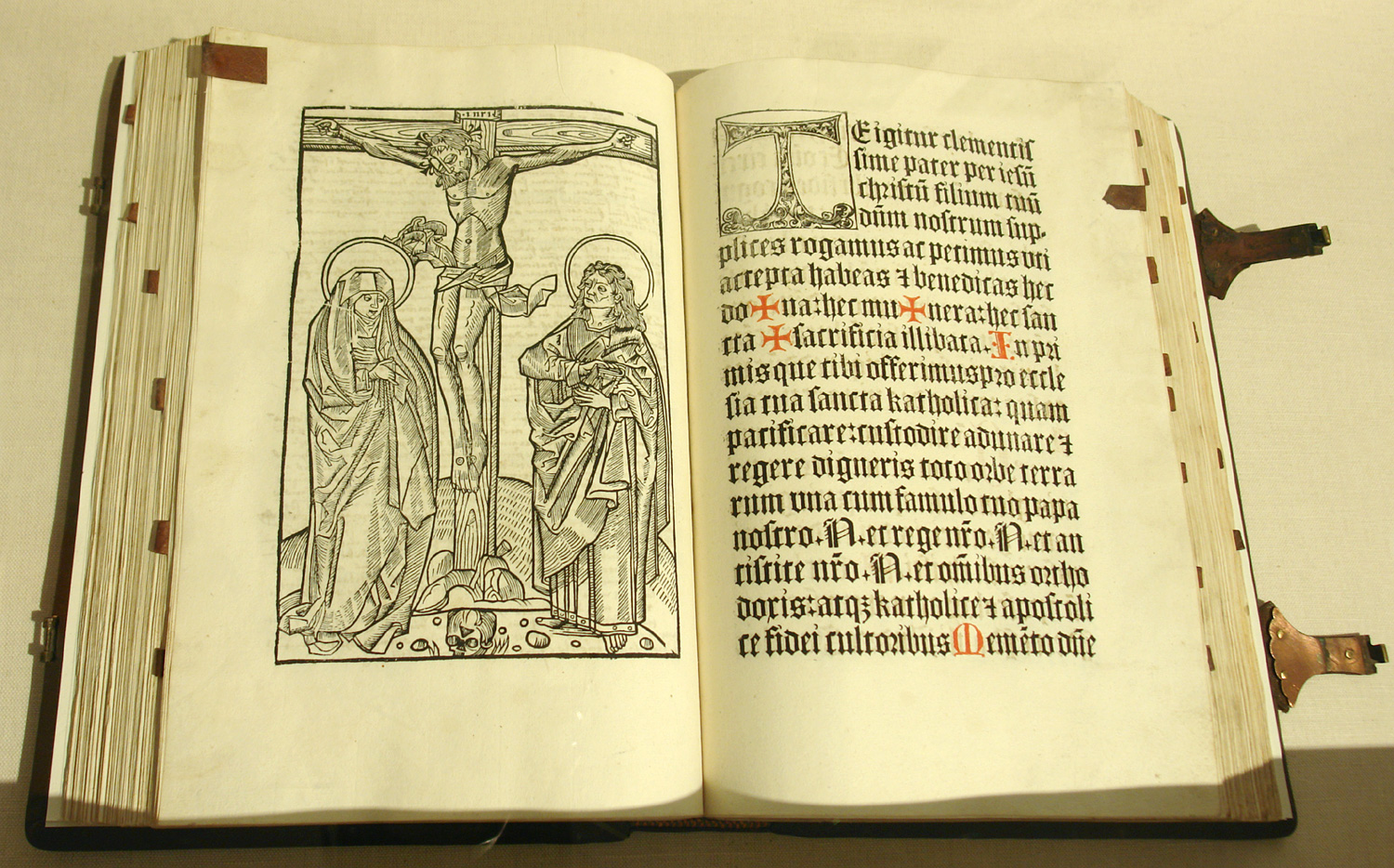 Bremer Dom-Museum: Missale secundum ritum Bremense, gedruckt bei Renatus Beck, Straßburg 1511. Das Missale (Meßbuch) ist das älteste Buch aus dem Bestand der heutigen Dombibliothek.